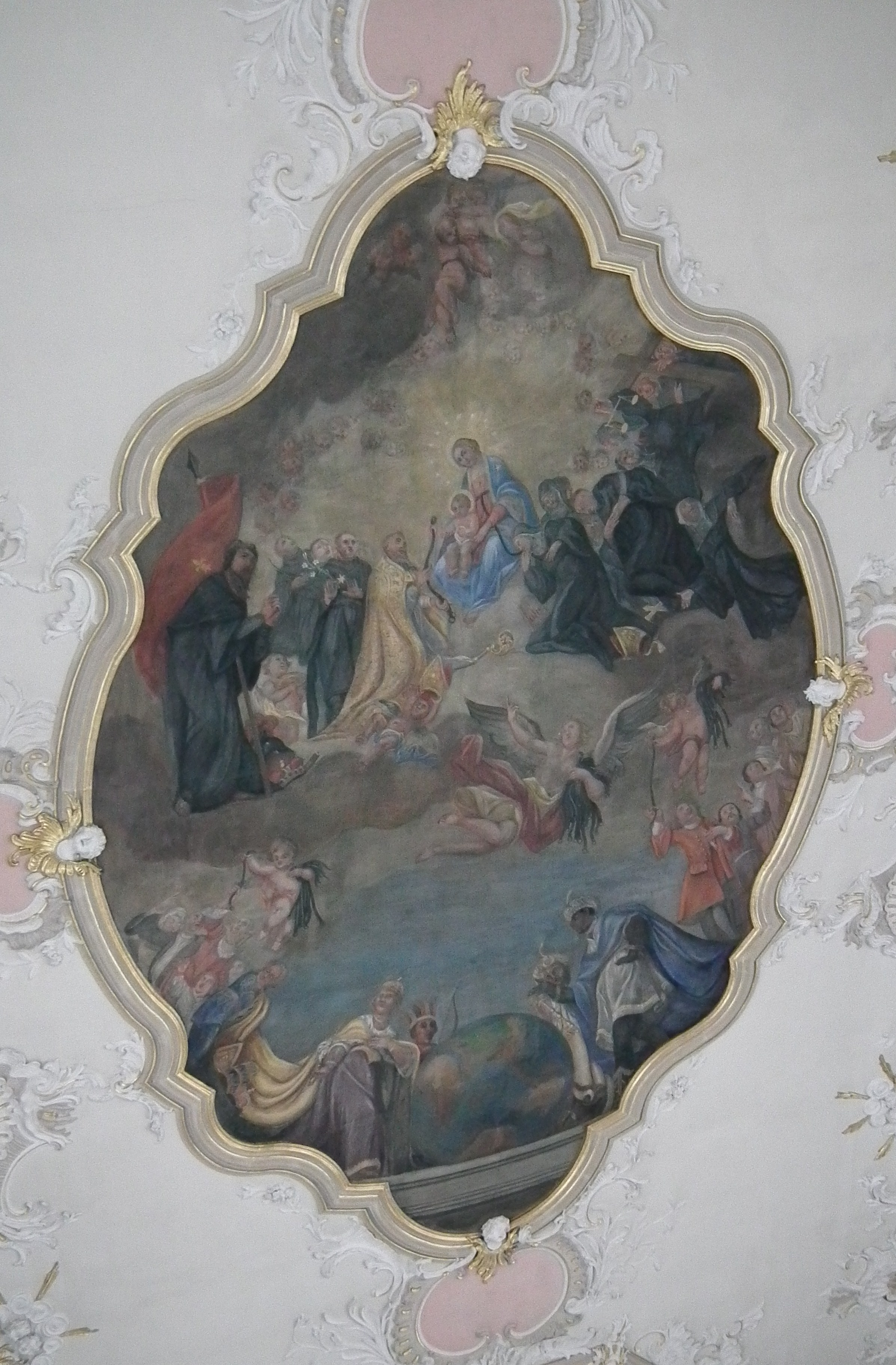 Deckenfresko in der katholischen Kirche St. Laurentius in Wiesloch (Baden-Württemberg, Deutschland)